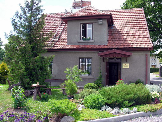 Klaipėdos universiteto botanikos sodas Foto: Algirdas, 2006 m. birželio 29 d.